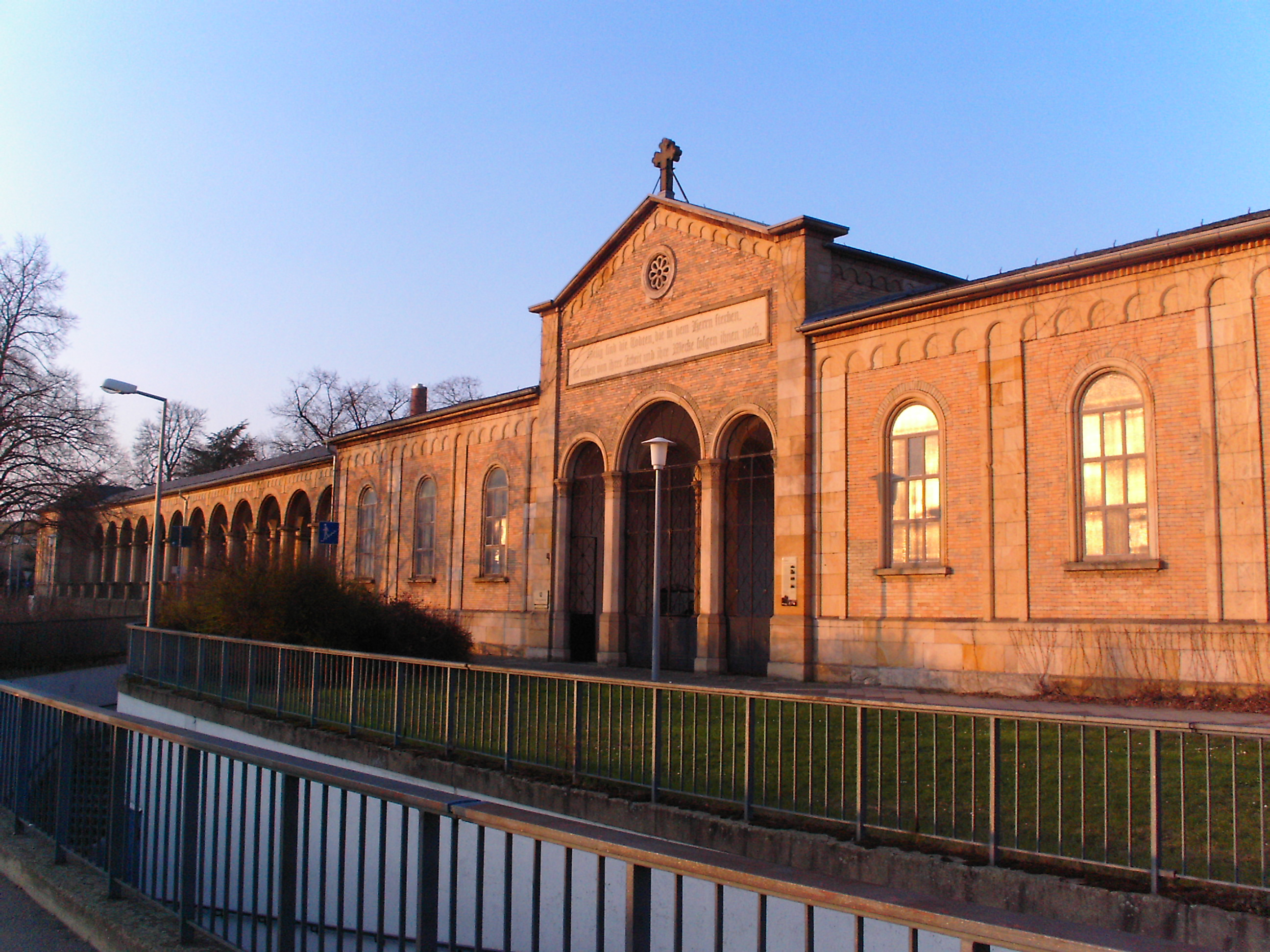 Hauptfriedhof Mannheim, Haupteingang und Arkadenbau